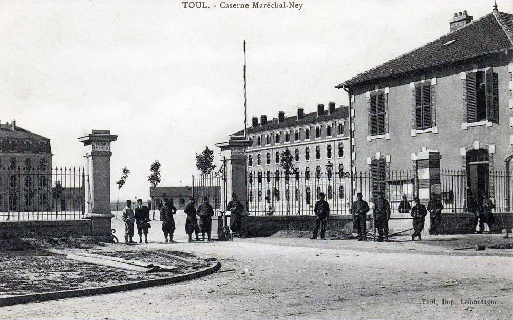 Toul, Caserne Maréchal Ney, c. 1915, carte postale